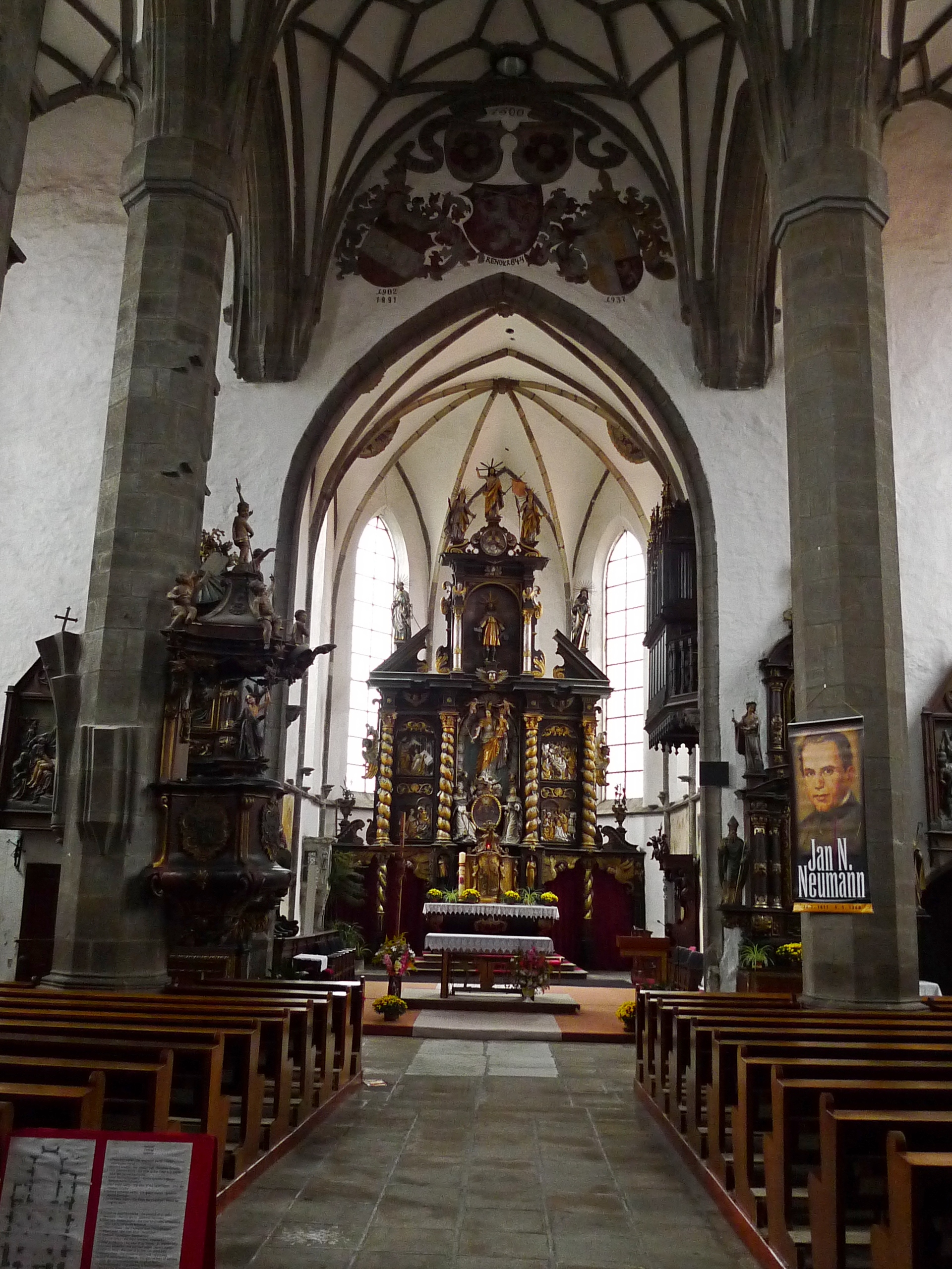 Kostel svatého Jakuba Většího, Kostelní náměstí, Prachatice I, Prachatice.